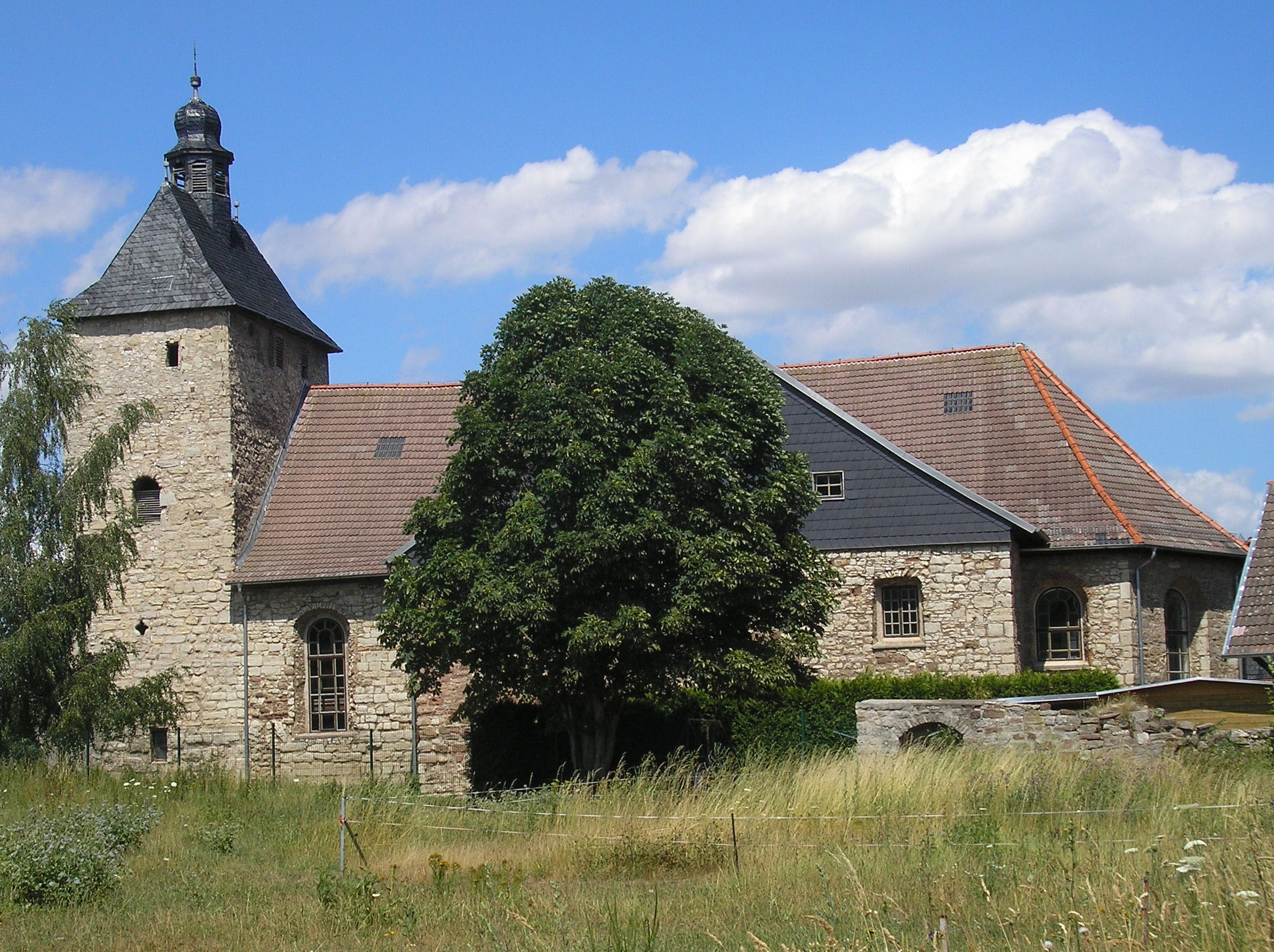 Die Kirche in Wolkramshausen (Thüringen).